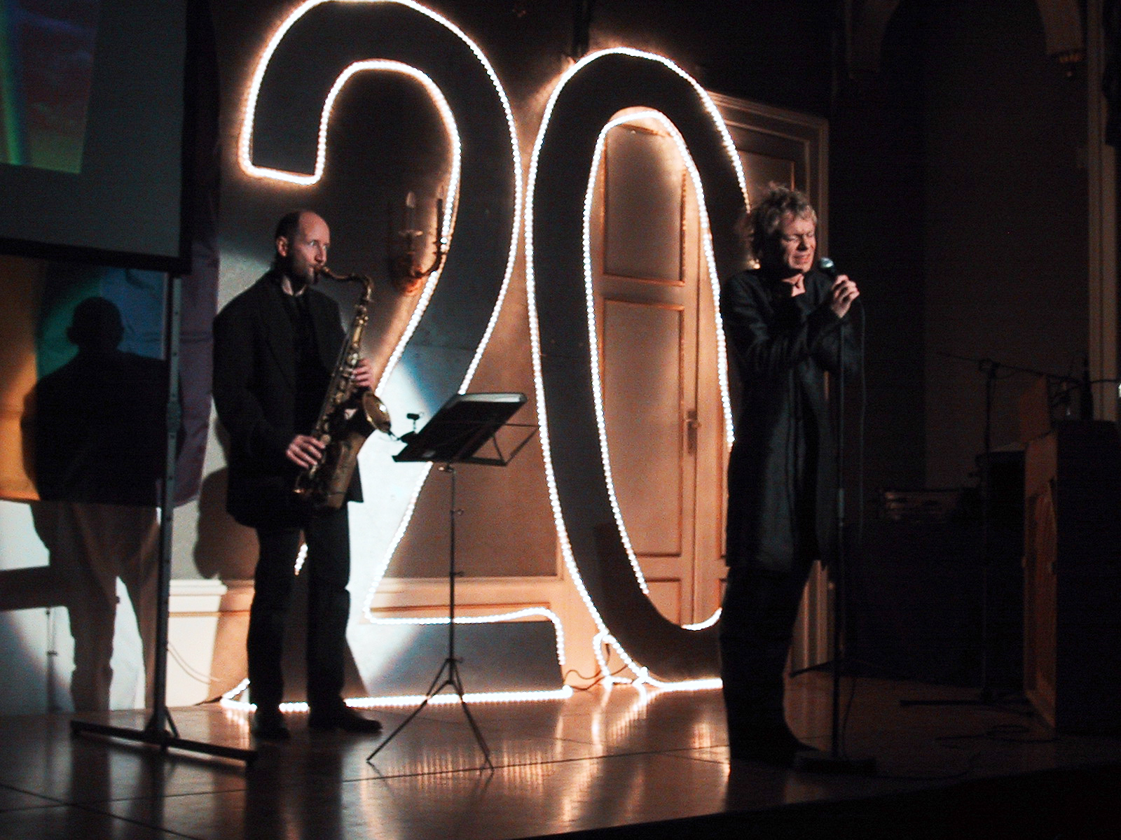 Karl M. Sibelius singt mit Saxophonbegleitung beim Fest "20 Jahre HOSI Linz", Redoutensäle – Linz